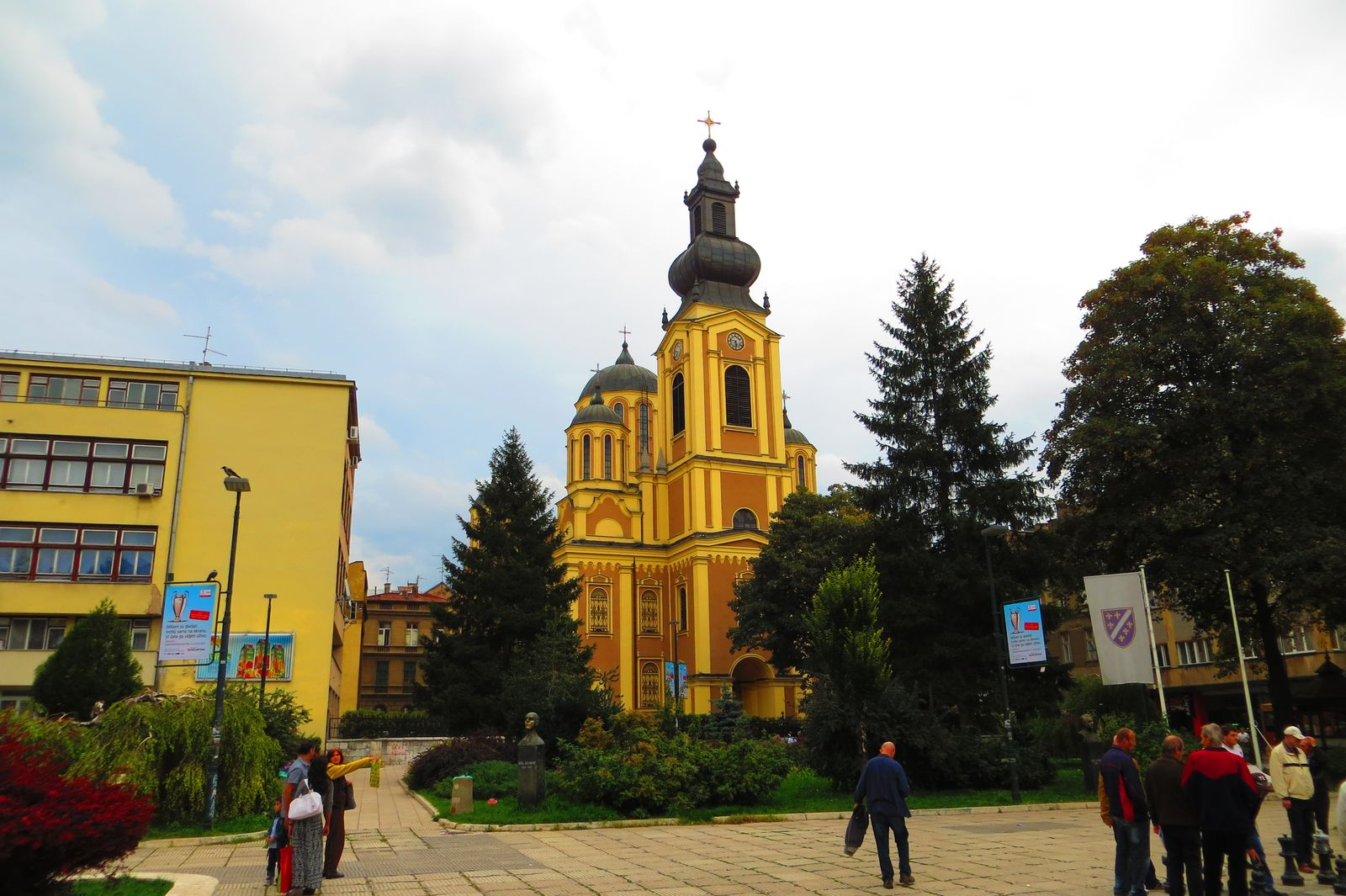 Saborna Crkva Rođenja Presvete Bogorodice